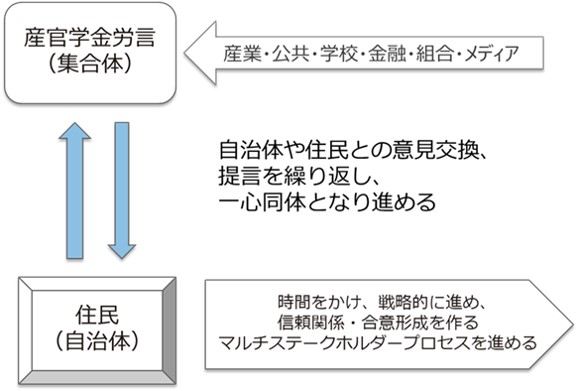 産官学金労言と住民の関係